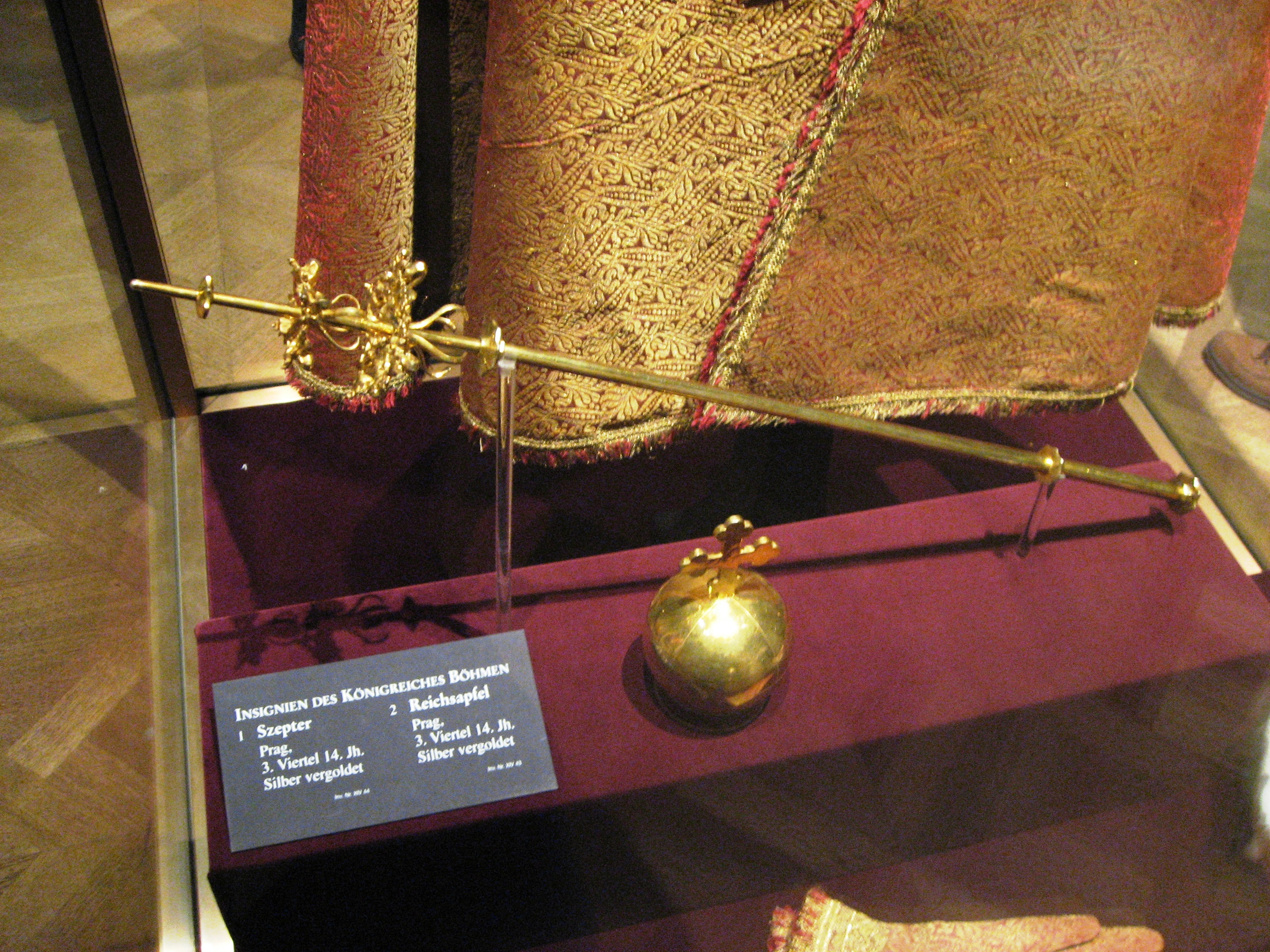 Insignien des Königreichs Böhmen. 1) Szepter. Prag, 3. Viertel 14. Jahrhunderts. Silber vergoldet. Inv. Nr. XIV 44. 2) Reichsapfel. Prag, 3. Viertel 14. Jahrhunderts. Silber vergoldet. Inv. Nr. XIV 43.